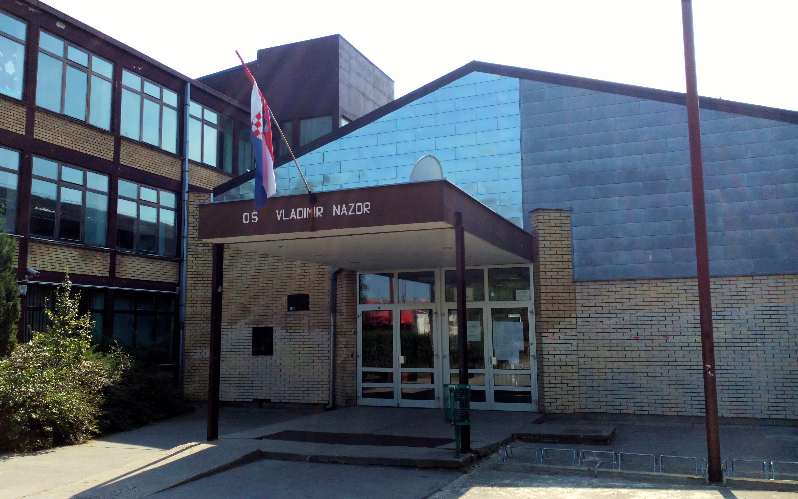 Osnovna škola Vladimira Nazora u Čepinu.